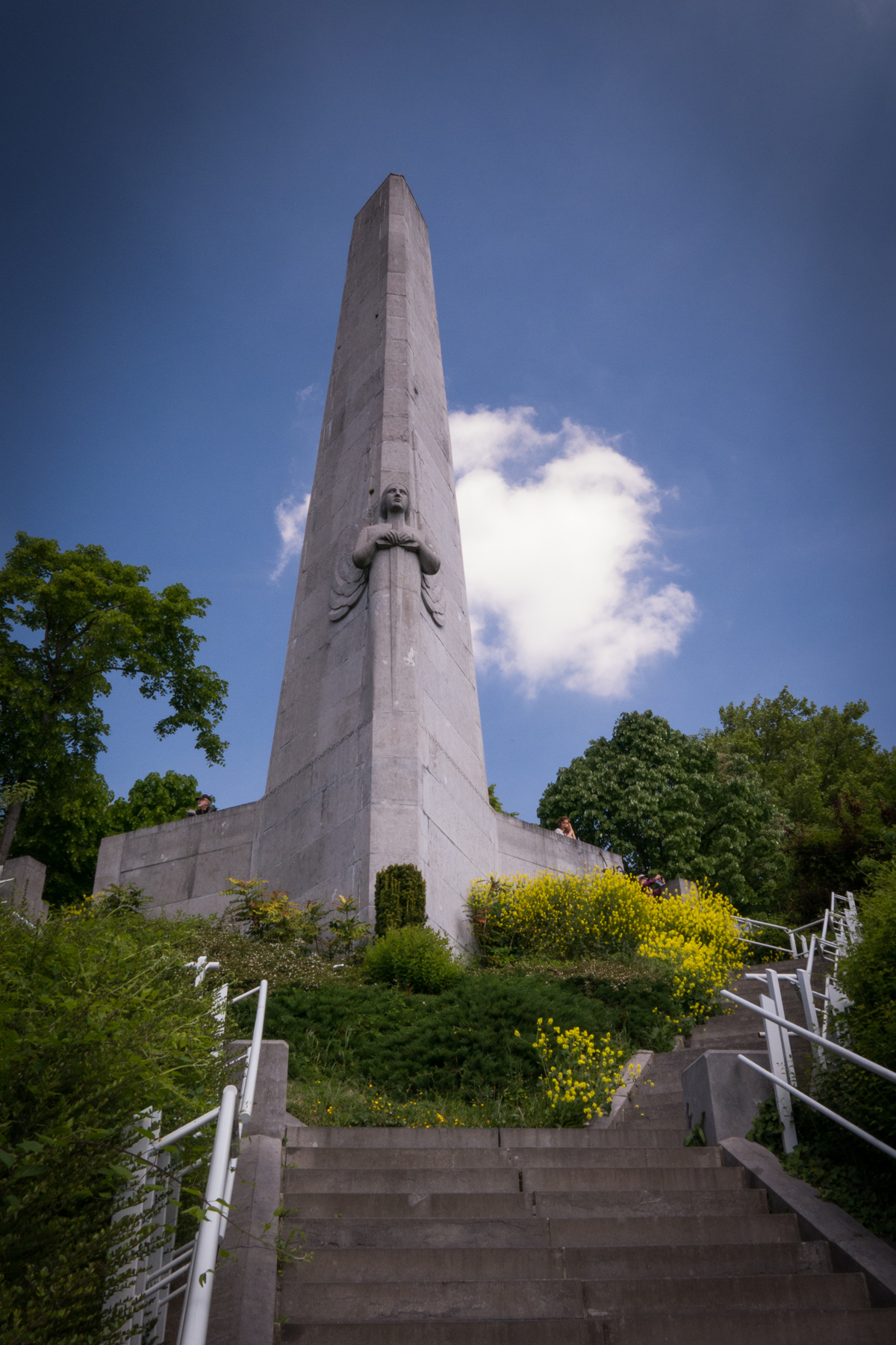 Monument au 14e Régiment de Ligne, dans le quartier Sainte Walburge